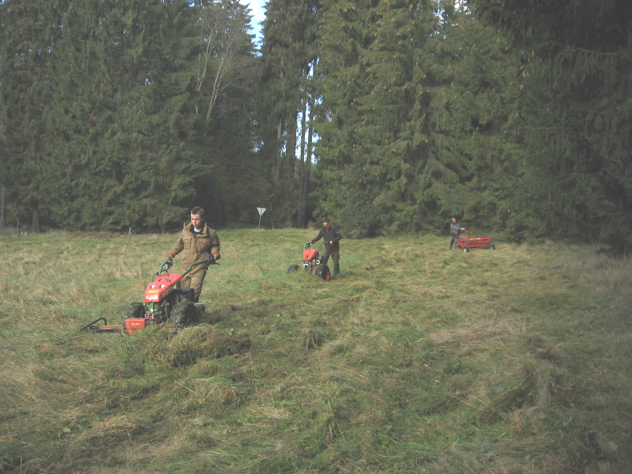 Mäharbeiten des „Verein für Natur- und Vogelschutz im Hochsauerlandkreis“ mit zwei Einachsmähern und einem Einachsschwader im NSG Wäschebach/Tieberg bei Marsberg-Westheim. Die Wiese ist Standort des Westfälischen Galmei-Veilchens (Viola guestphalica). – Links ein Agria-Einachsgeräteträger Taifun mit Portalmähwerk, mittig ein Agria-Einachsgeräteträger mit Mähbalken, rechts ein Honda-Einachsgeräteträger mit Bandrechen.